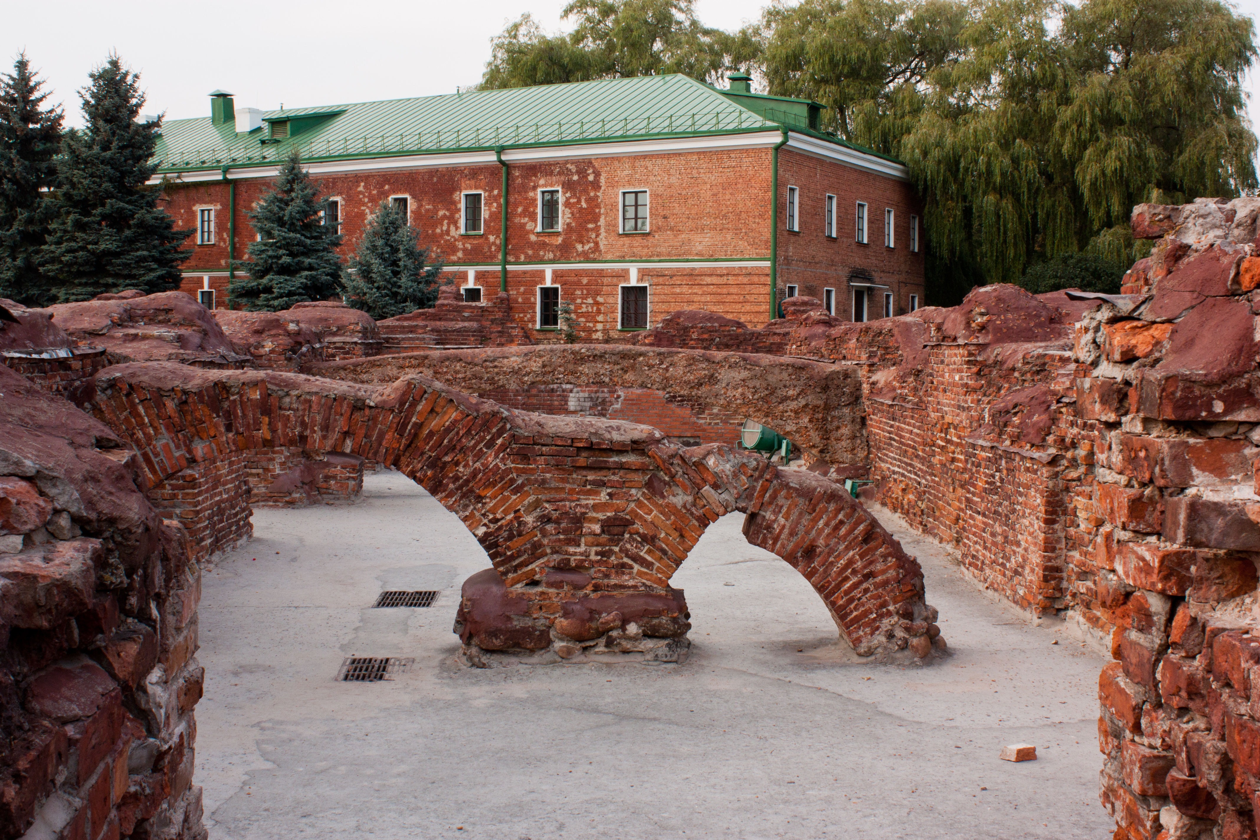 Беларуская (тарашкевіца): Цытадэль — абарончая казарма, руіны Белага палаца, Інжынэрнага ўпраўленьня, Арсэналу, казармы пагранічнікаў, падмурак сталовай каманднага складу. г. Берасьце This is a photo of Belarusian heritage monument. Reference number: 110Г000724 ( WLM)